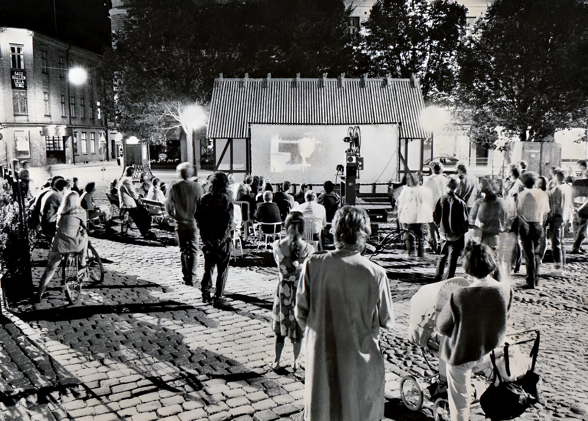 Folkets Bio i Malmö anordnade friluftsvisningar på Lilla Torg 1989. Projektorn var en Prevost.